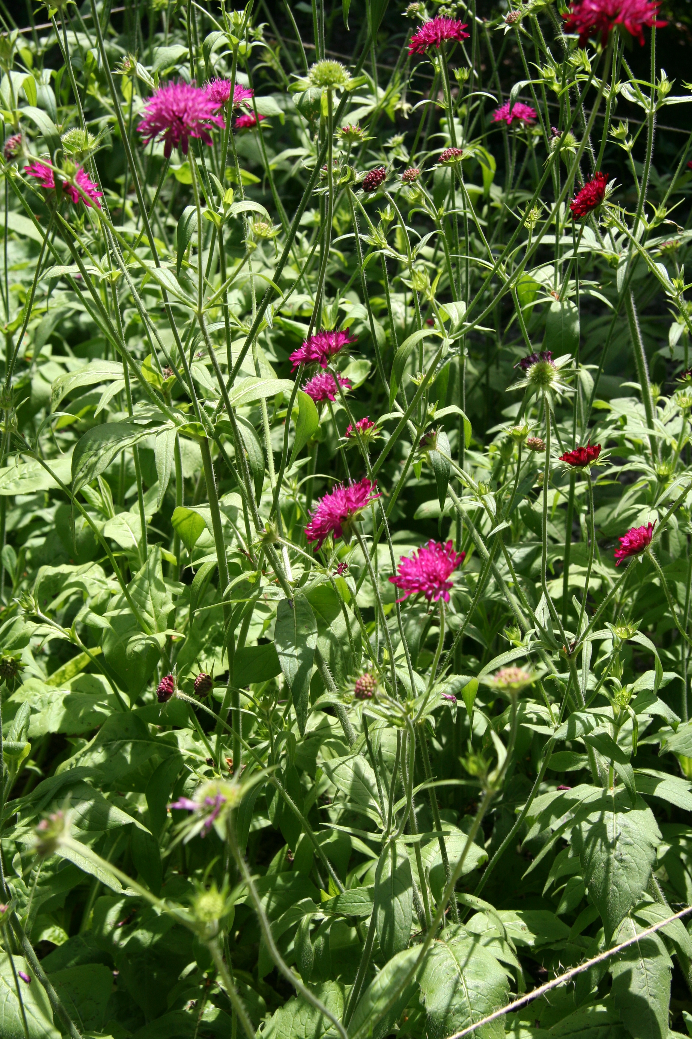 Knautia macedonica im Botanischen Garten Dresden